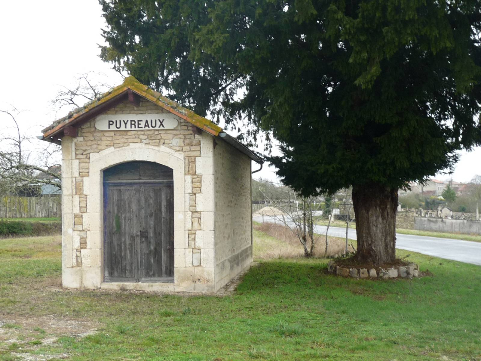 ancienne gare à Puyréaux (16), France